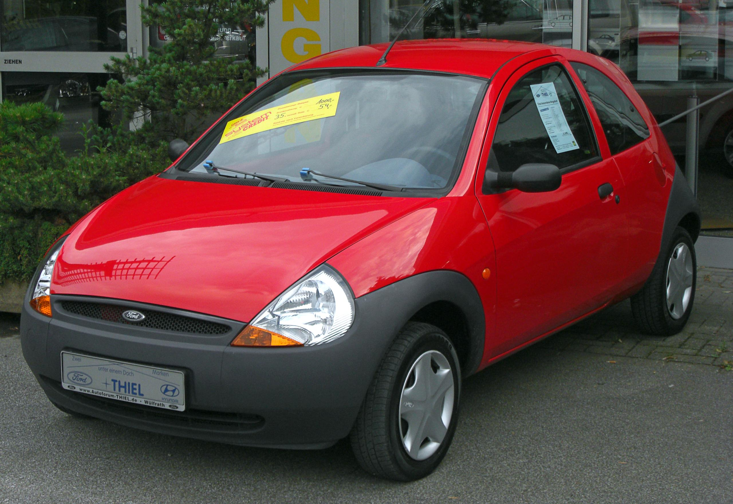 Ford Ka